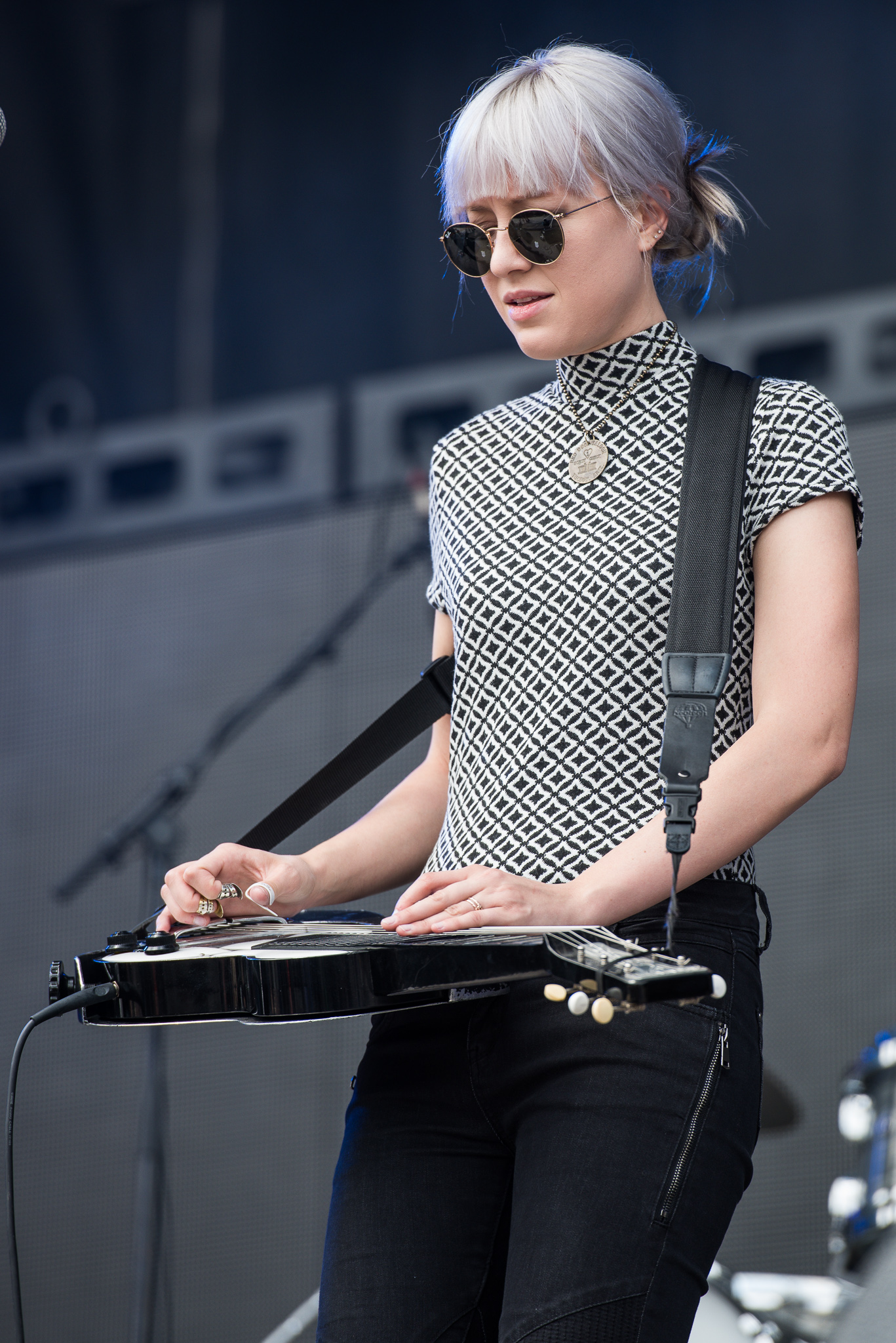 ARGO-Konzerte,Beck's Park Stage,Festival,Konzert,Larkin Poe,Livekonzert,Livemusik,Megan Lovell,Musik,RiP,Rock im Park 2016